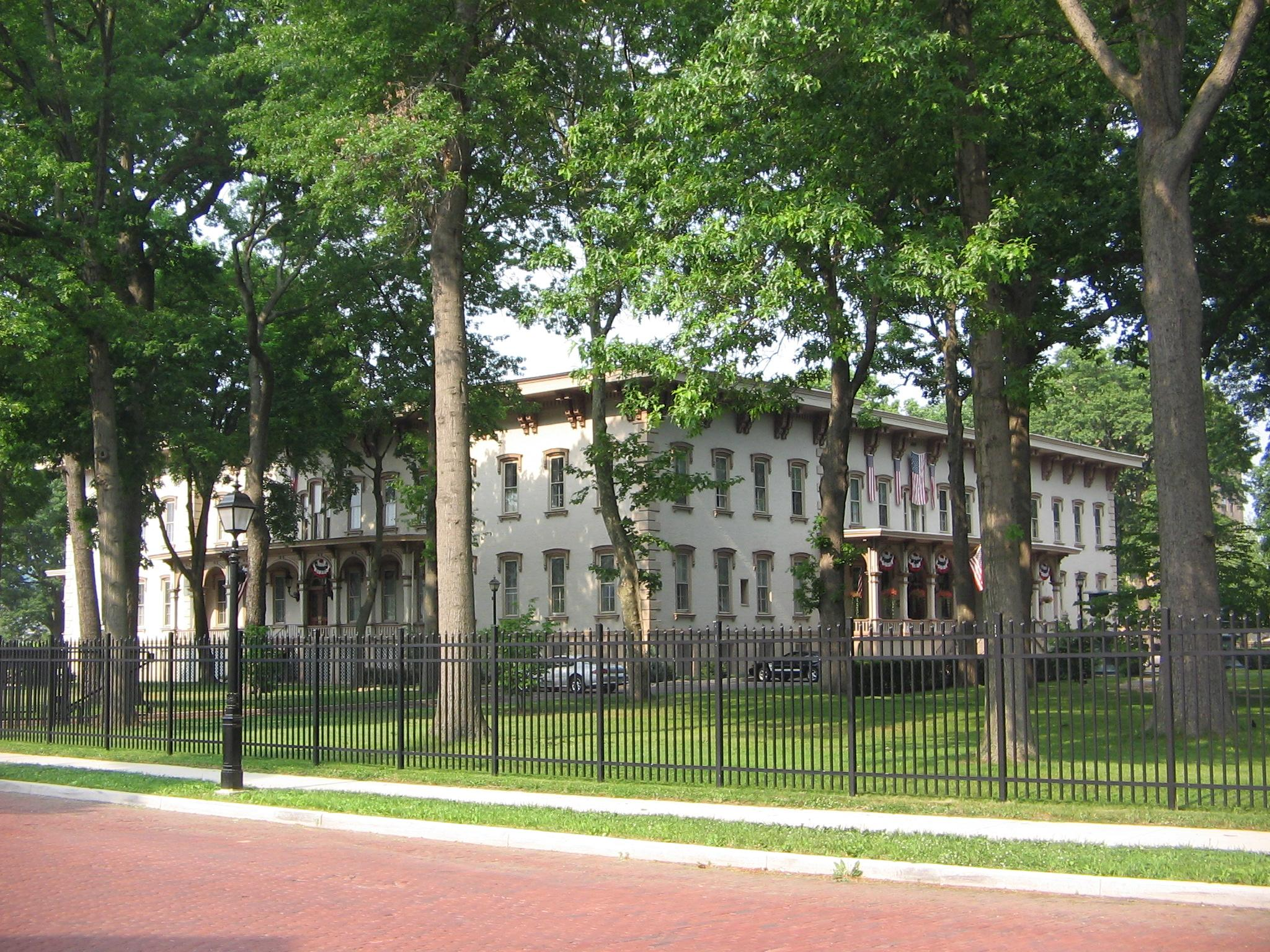 Former Park Hotel, Williamsport, Pennsylvania, USA.